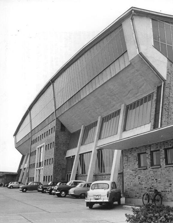 Schwerin, Sport und Kongresshalle Zentralbild Kohls 15.9.1964 15. Jahrestag der DDR Die Sport- und Kongresshalle in Schwerin In ihrer architektonischen Gestaltung zählt die Halle zu den modernsten der DDR. Das Aluminiumdach umfasst 5600 m². Vier Pfeiler und zwei Querträger zu je 80 t tragen die Halle. Das Gesamtgewicht der Stahlkonstruktion mit seiner Verglasung beträgt 500 t. bei bühnen- und Boxveranstaltungen finden 8000 Zuschauer Platz. bei anderen Sportveranstaltungen wie Hallenhandball oder Leichtathletik sind es 6000 Plätze. die letzten sportlichen Höhepunkte erlebte dieser hochmoderne Bau bei den Olympia-Ausscheidungskämpfen im Boxen und Turnen (Frauen).